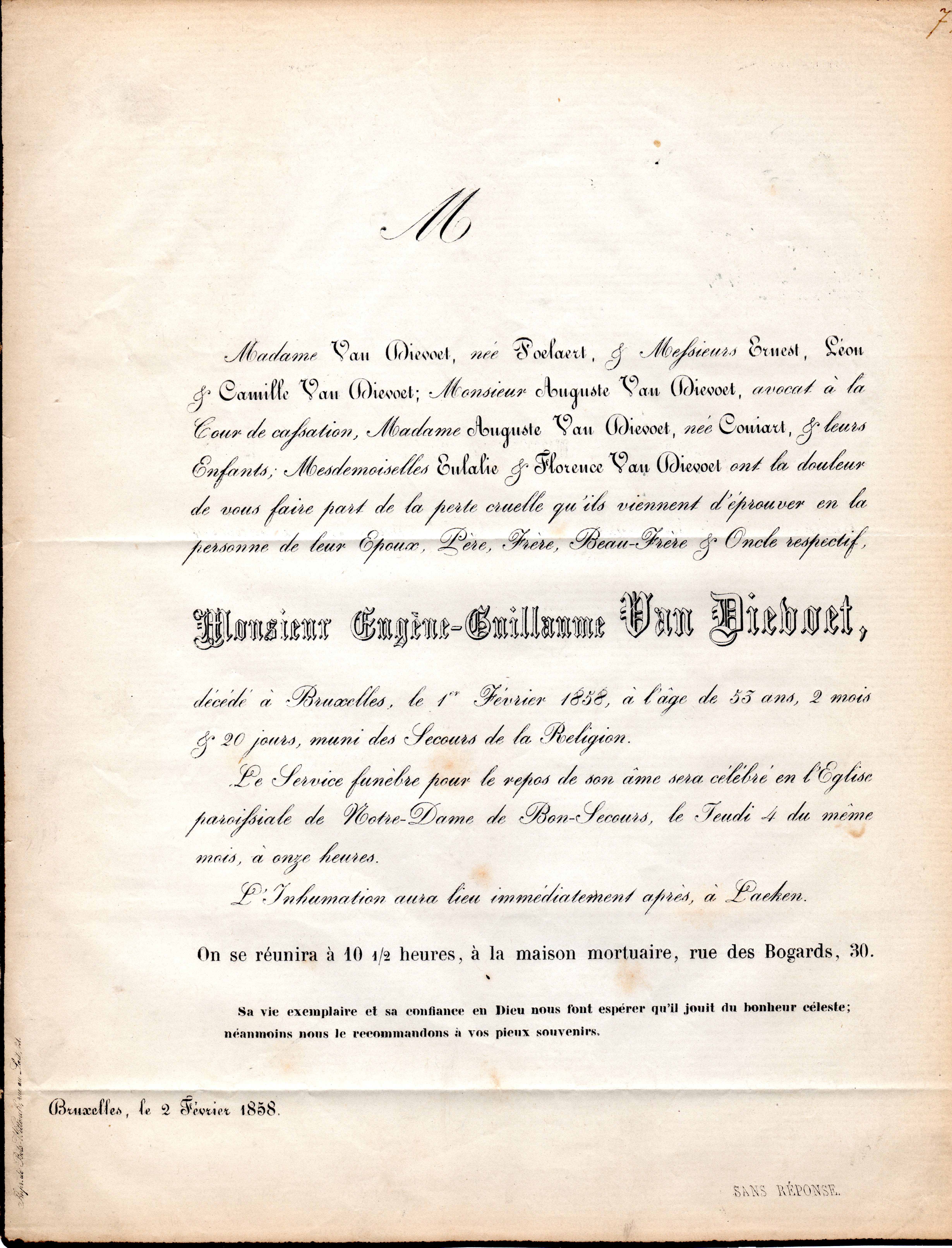 Faire part de décès d'Eugène van Dievoet époux de Hortense Poelaert